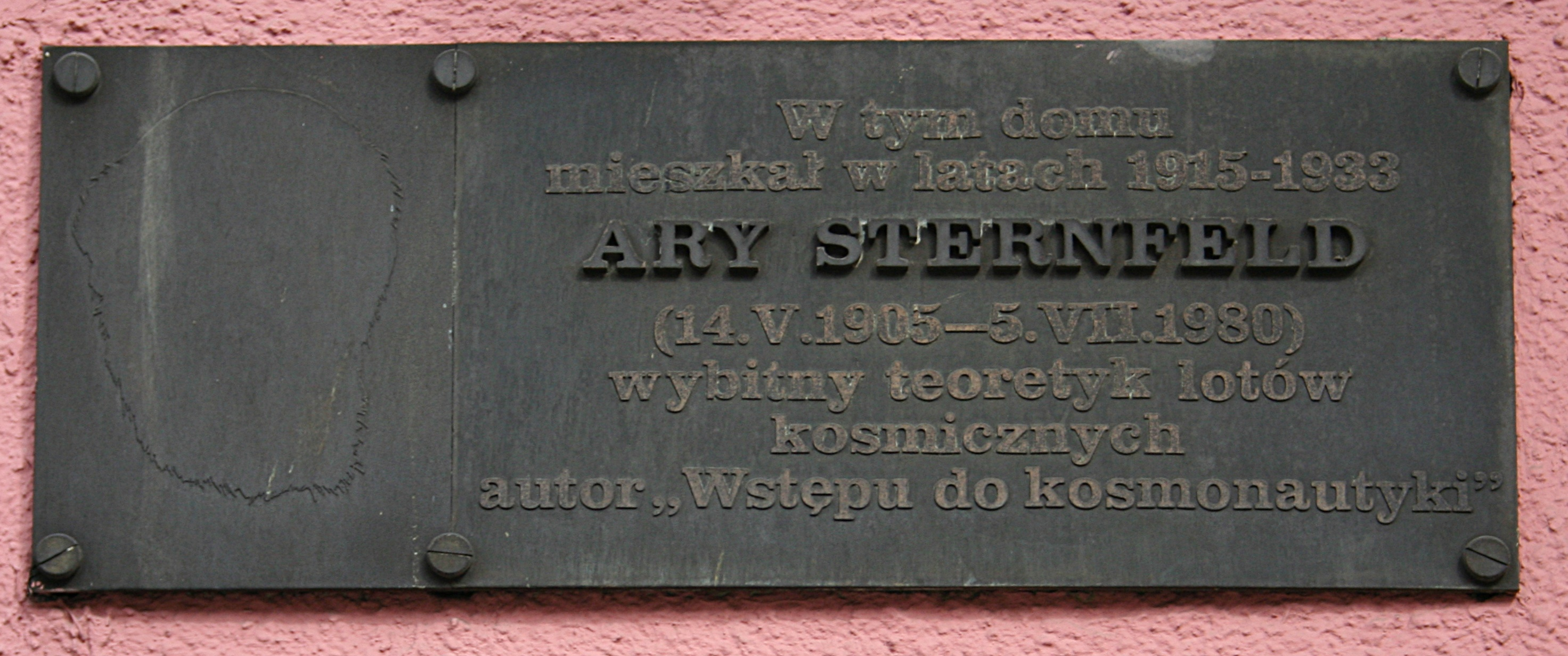 Fotowarsztaty w Łodzi, ul. Więckowskiego. Tablica informacyjna na murze kamienicy, w której mieszkał Ary Sternfeld.